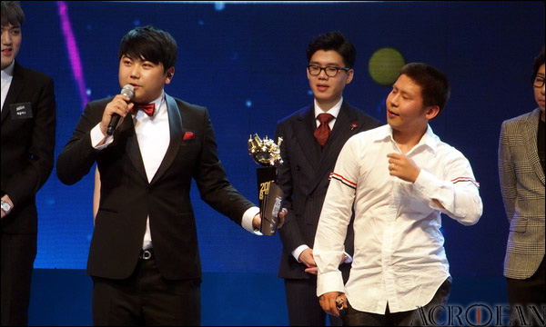 2015 아프리카TV BJ 대상 시상식